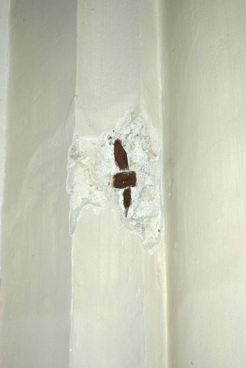 Geöffnete Säule mit Eisenkette, Kirche St. Zeno (Bad Reichenhall)